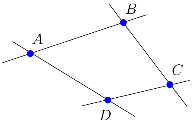 Projektive Ebene: allgemeine Lage von 4 Punkten